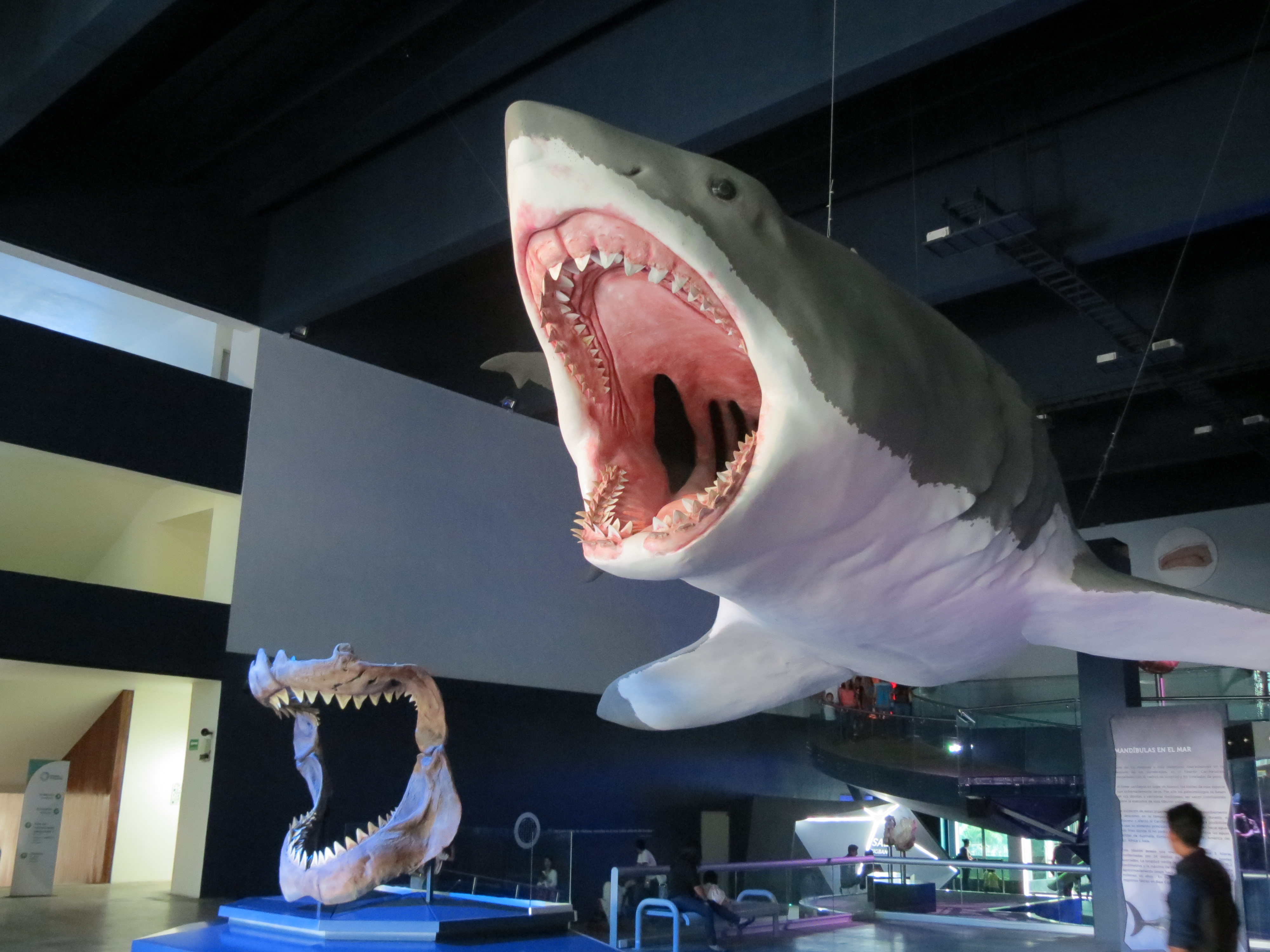 Reconstrucción de un Megalodon a escala real (16 metros de largo) y una dentadura en el Museo de la Evolución de Puebla